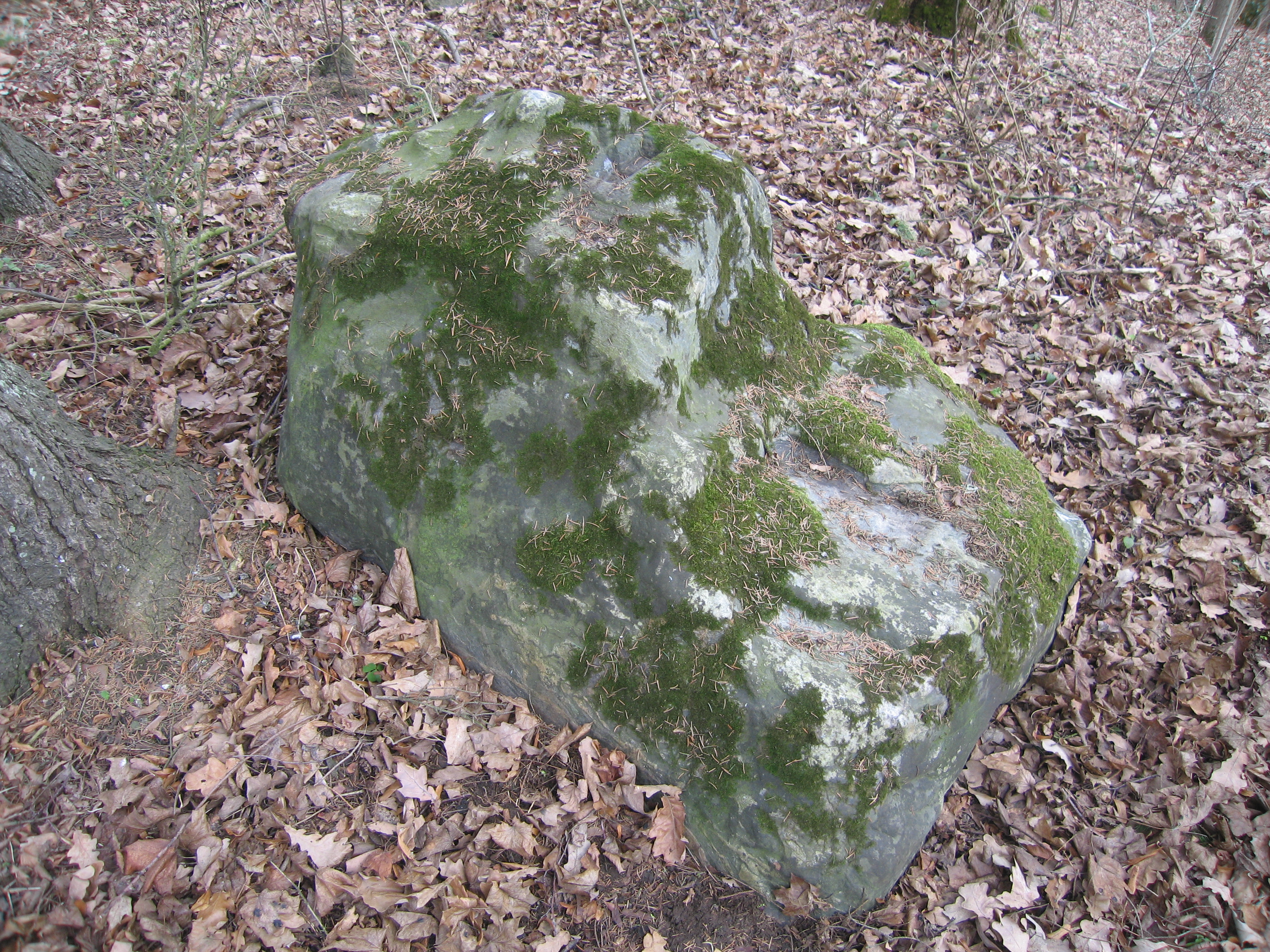 Hauaristi aluskivi